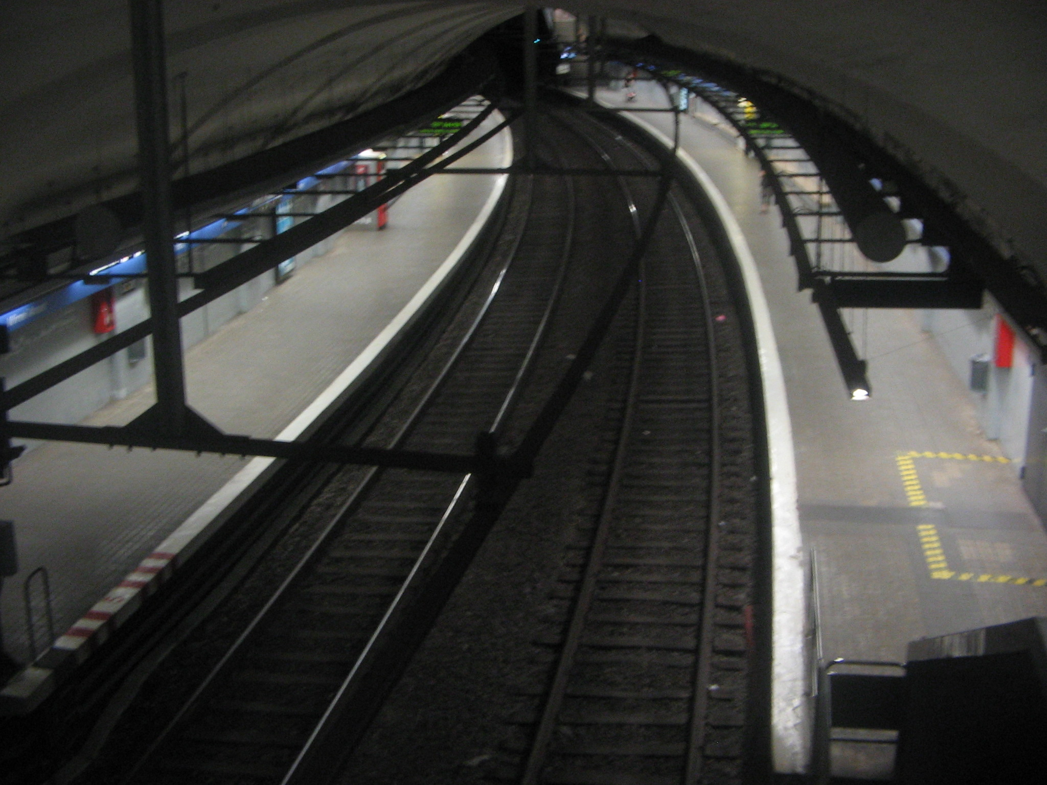 Estació de Virrei Amat.